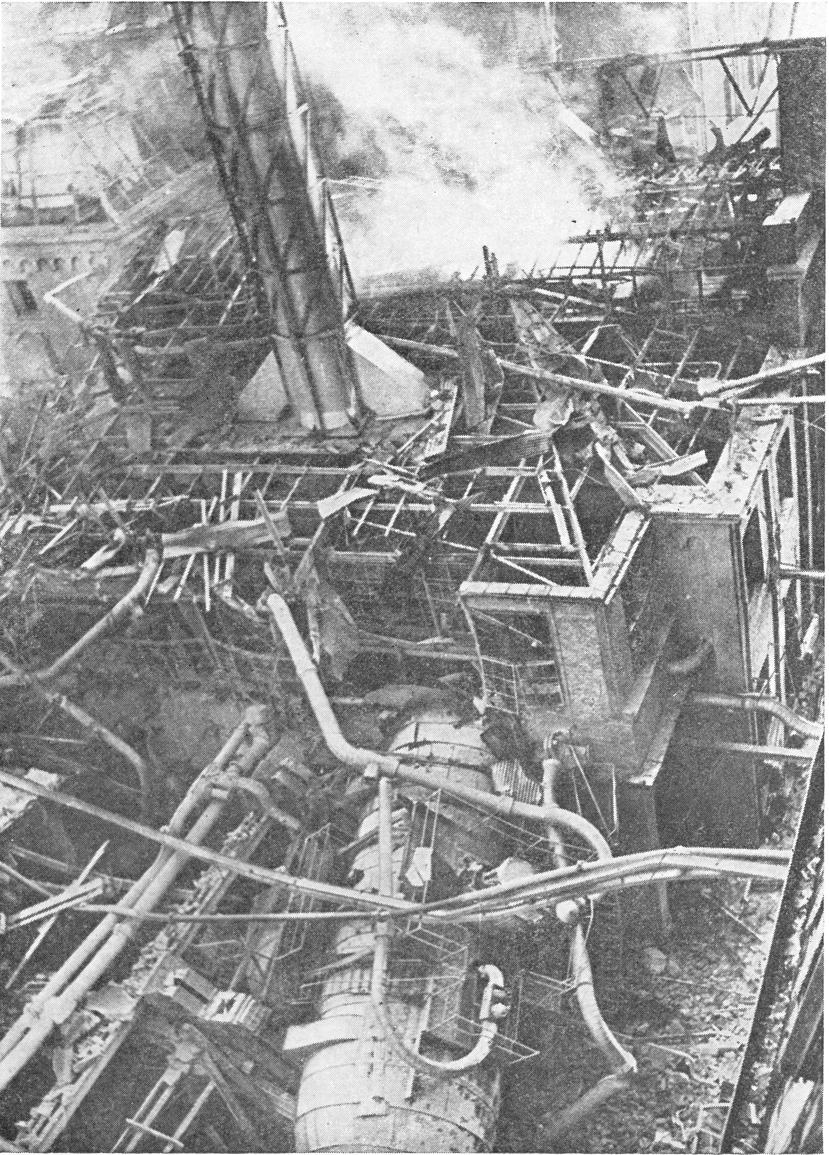 Ruinerne af Kedelhus og Maskinhal efter Attentatet. I Forgrunden den i Maskinrummet nedstyrtede Ruths Dampakkumulator.